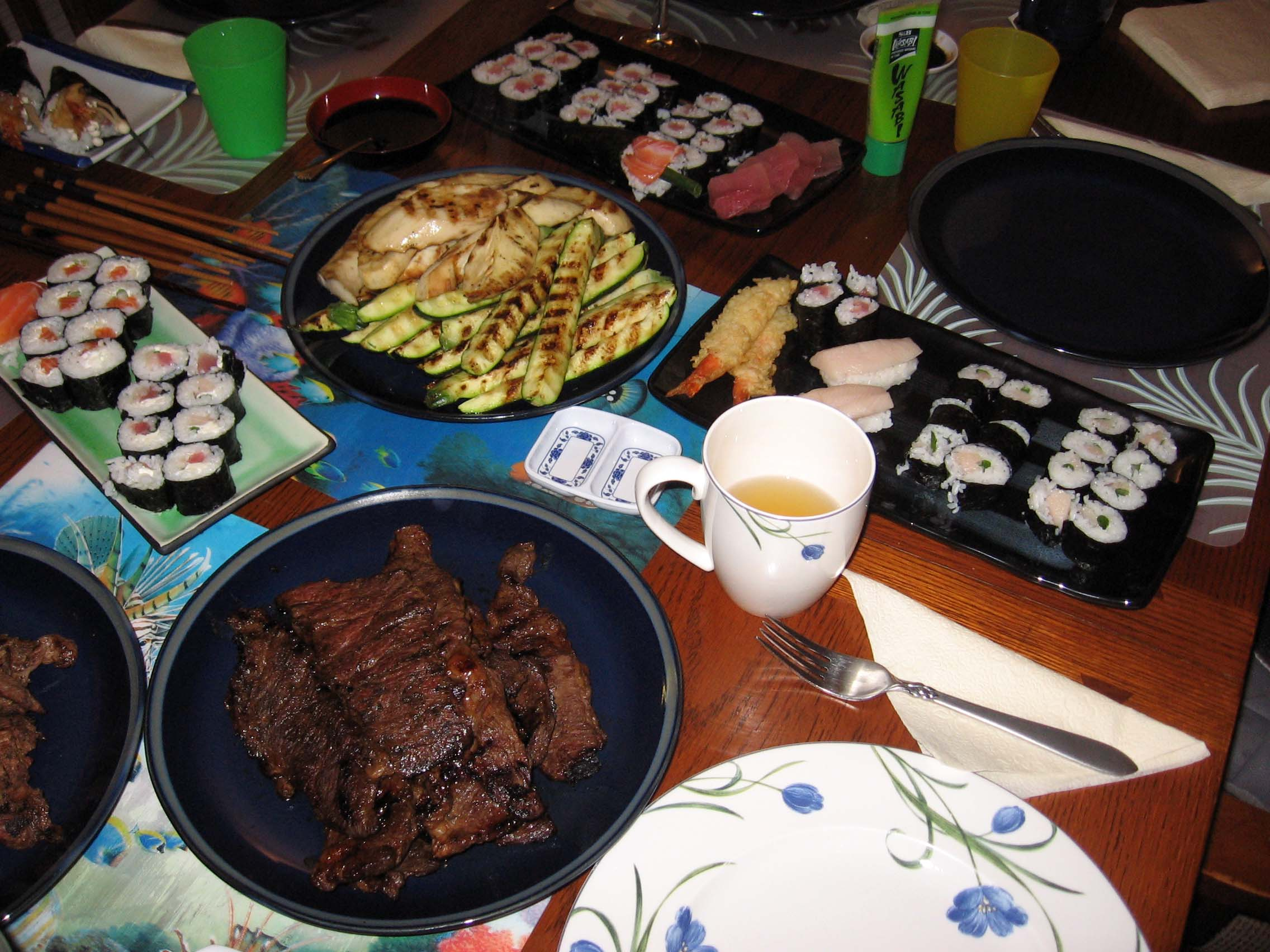 Pictures 090